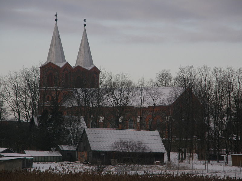 Latgaļu: Borkovys katuolu bazneica